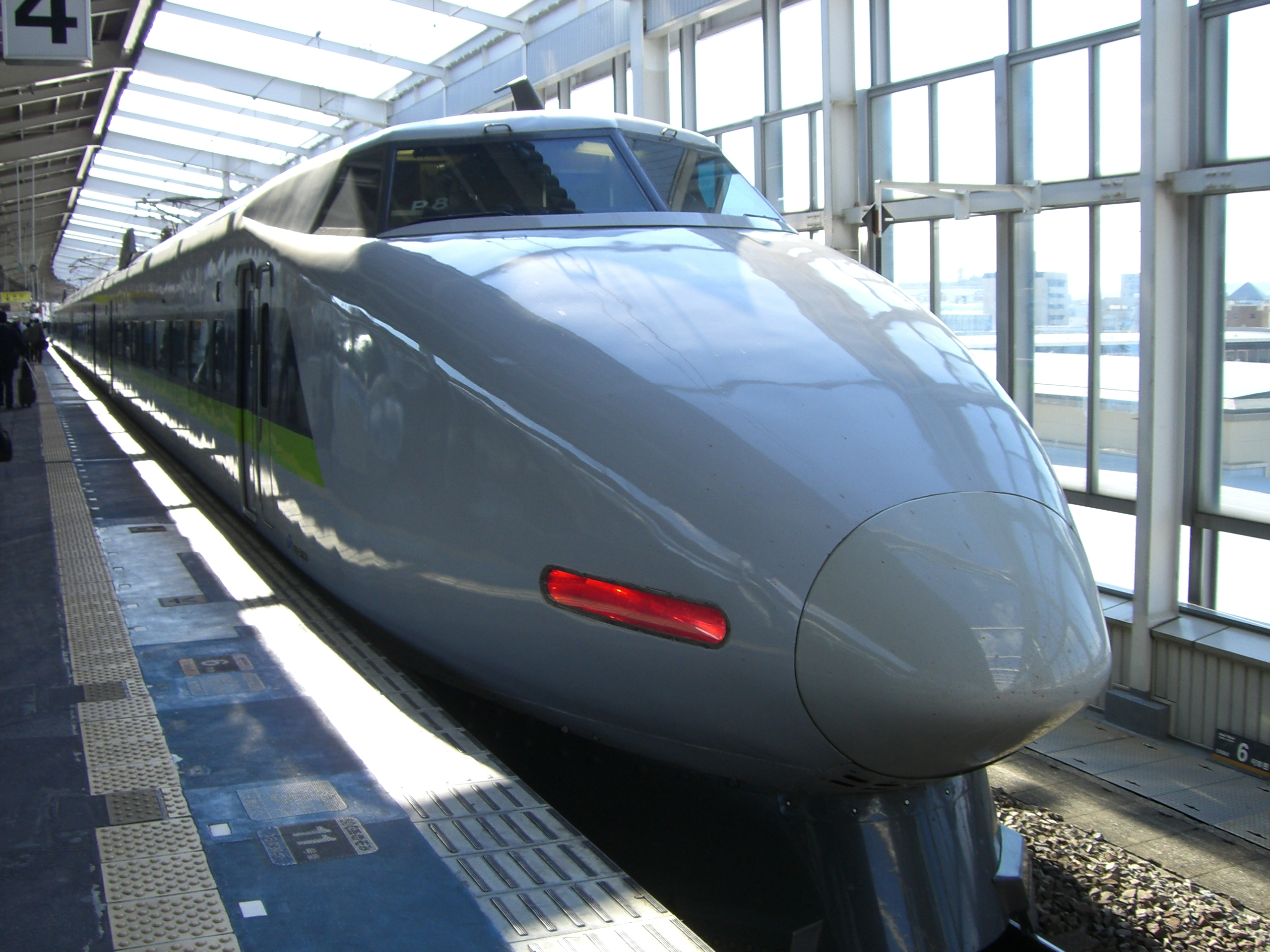 Shinkansen Series 100 in Okayama Station